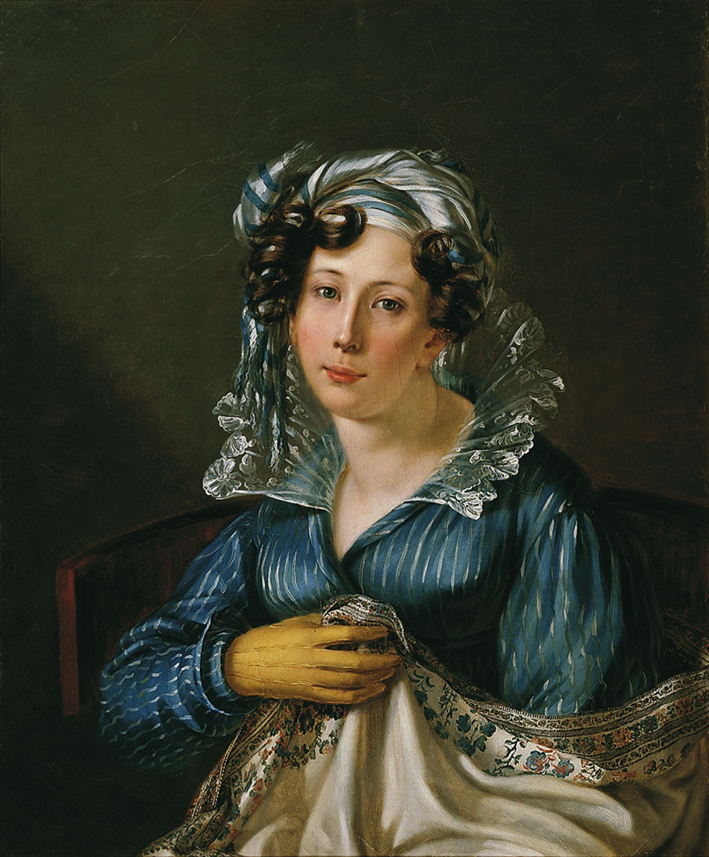 Вяземская Вера Федоровна